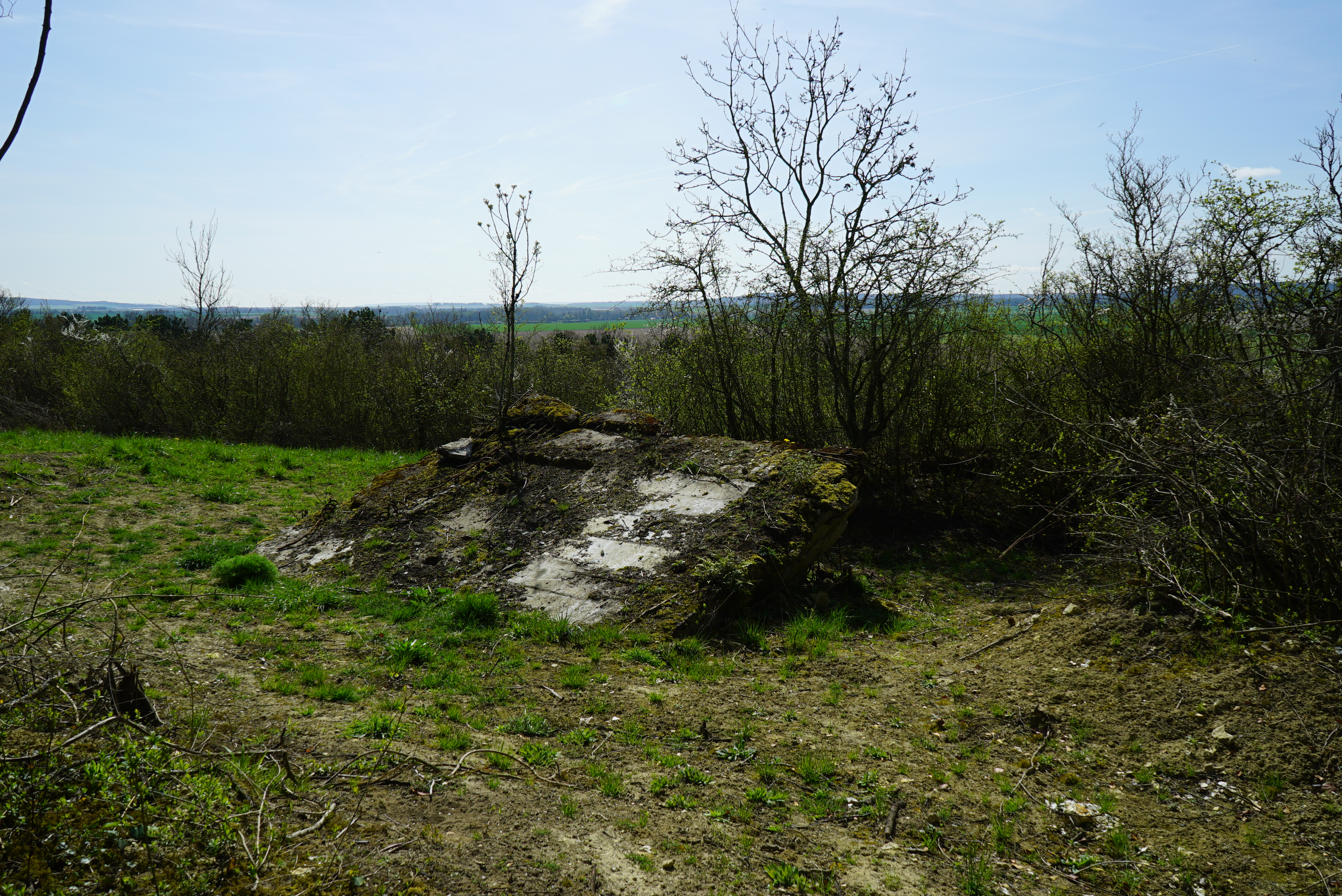 côte 108 Berry-au-Bac.